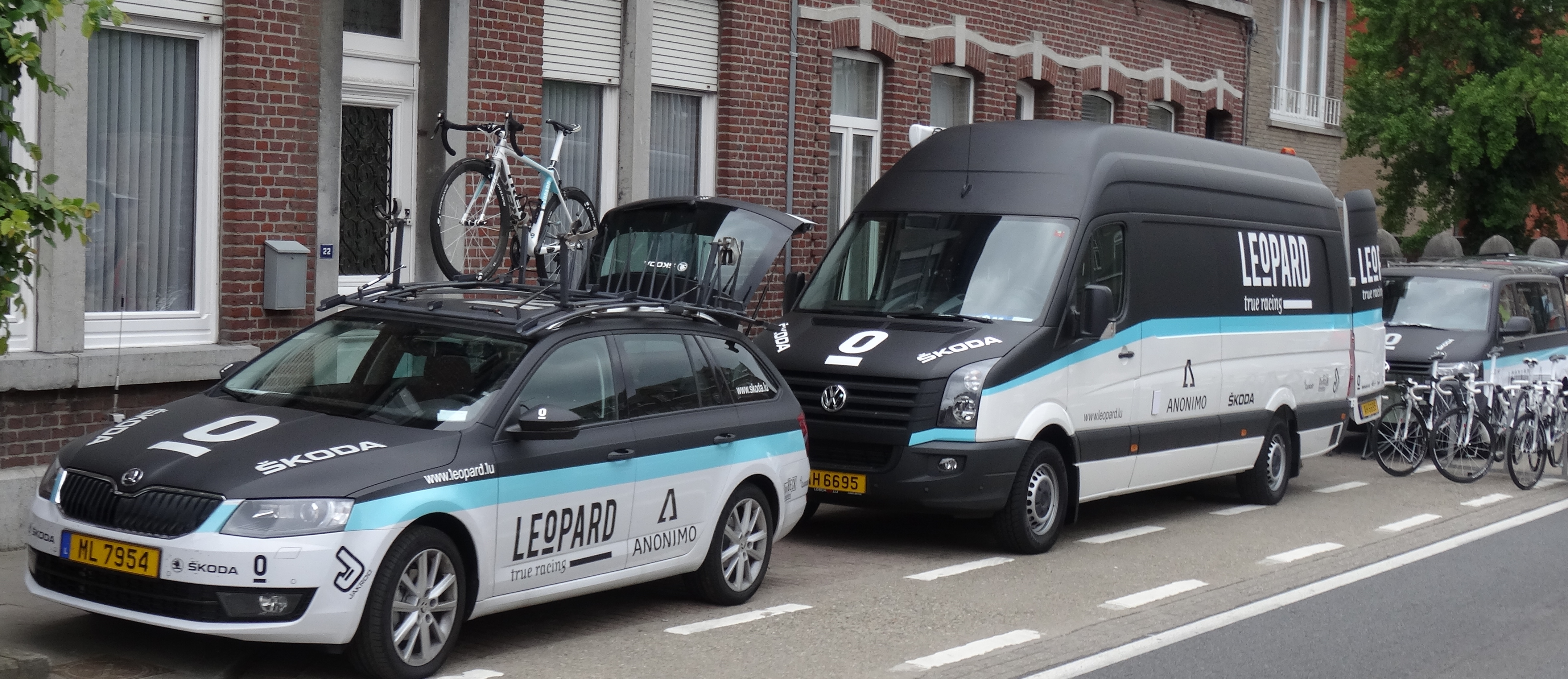 Reportage photographique réalisé le dimanche 15 juin à l'occasion du départ et de l'arrivée du Tour du Limbourg 2014 à Tongres, Belgique.